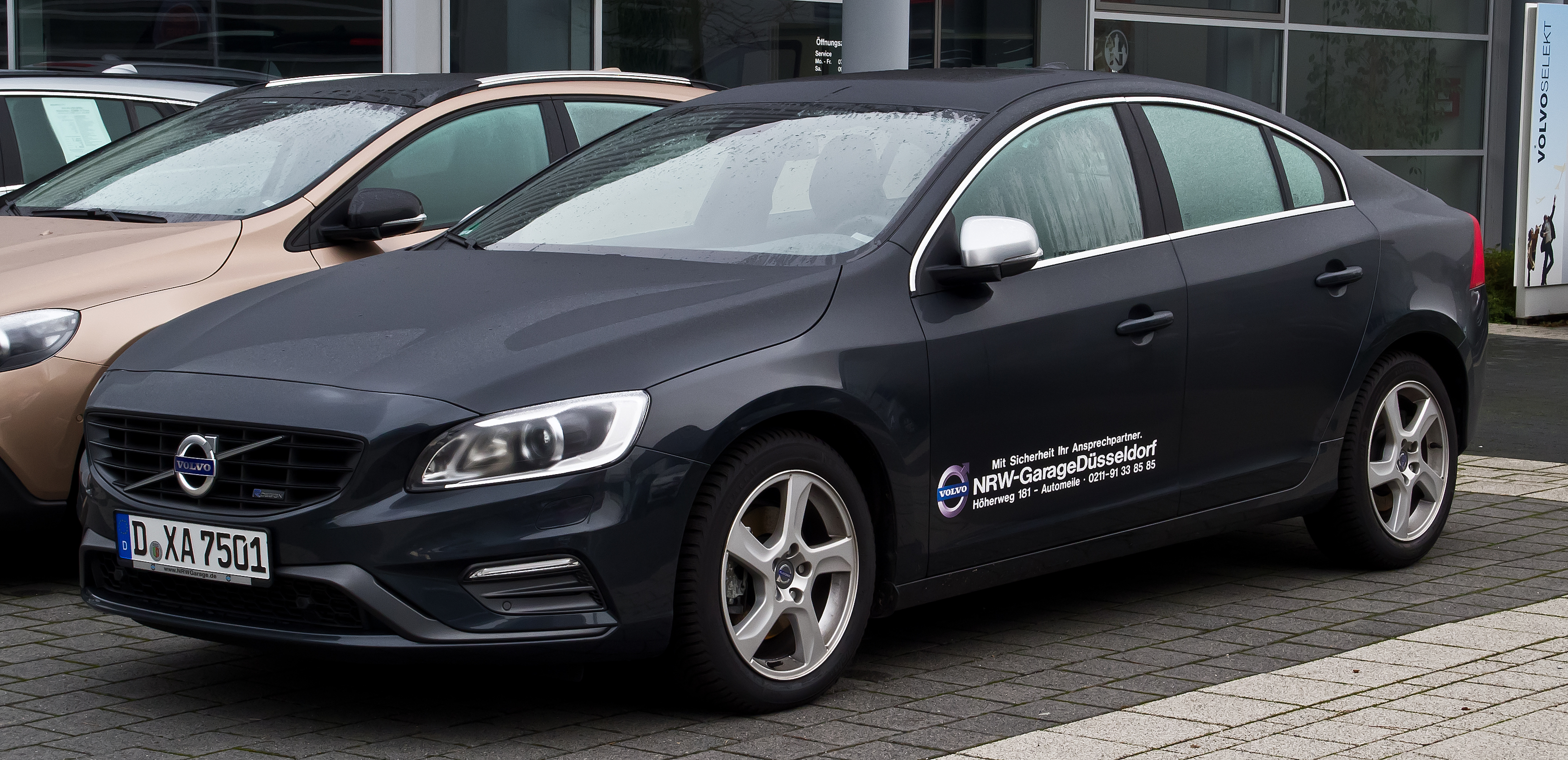 Volvo S60 R-Design (II, Facelift)